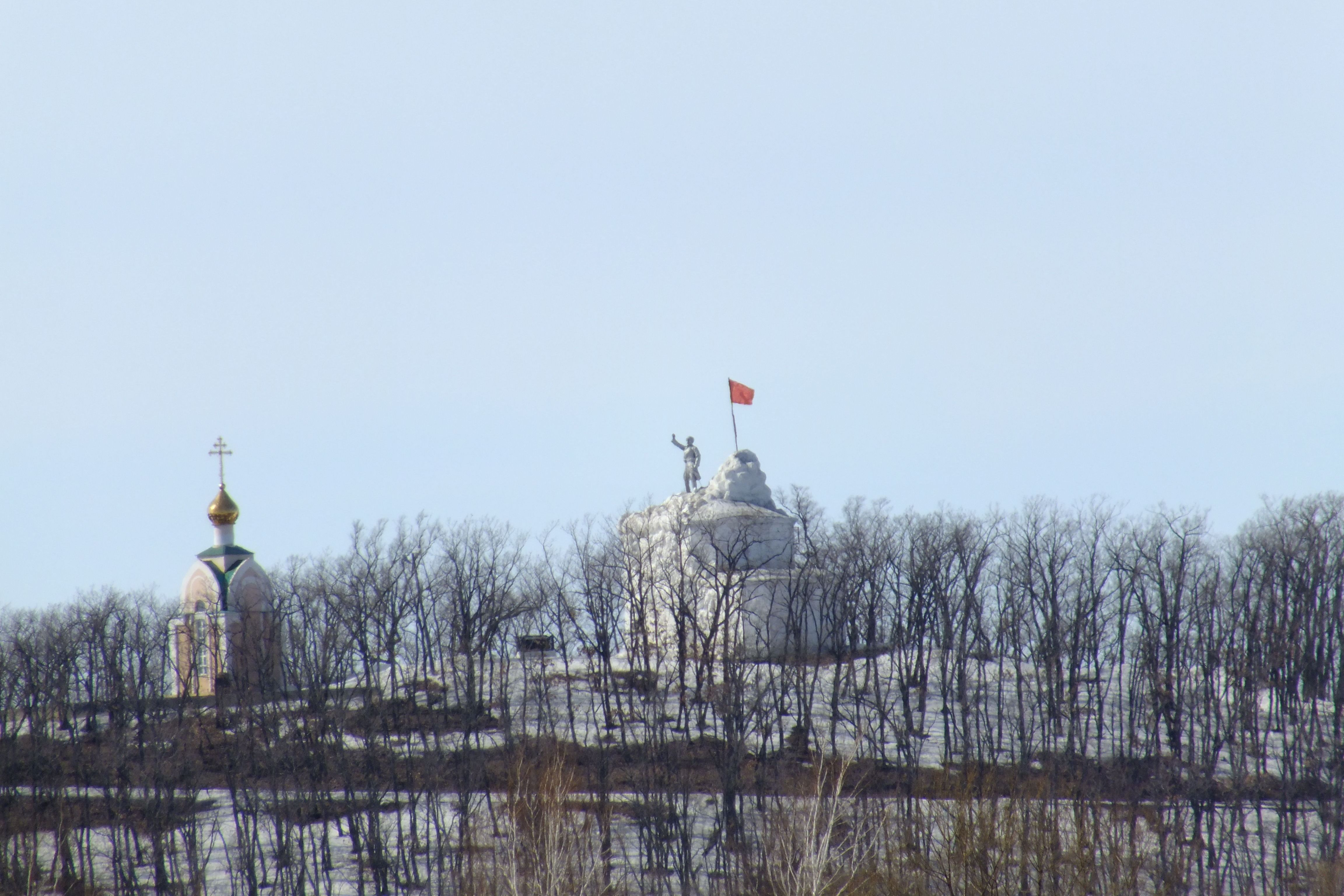 Сопка Июнь-Корань ЕАО март 2015